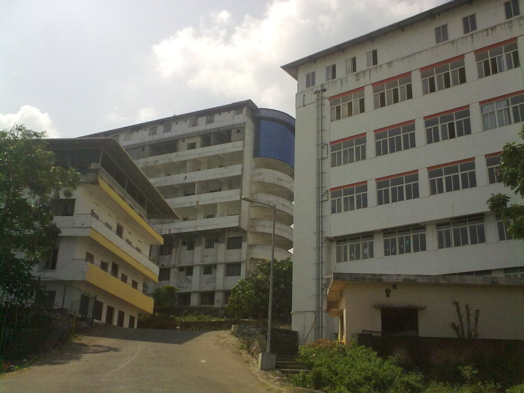 Azeezia, meeyannoor